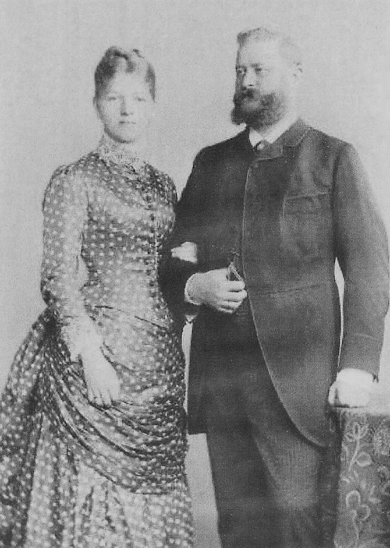 Scan eines alten Familienfotos